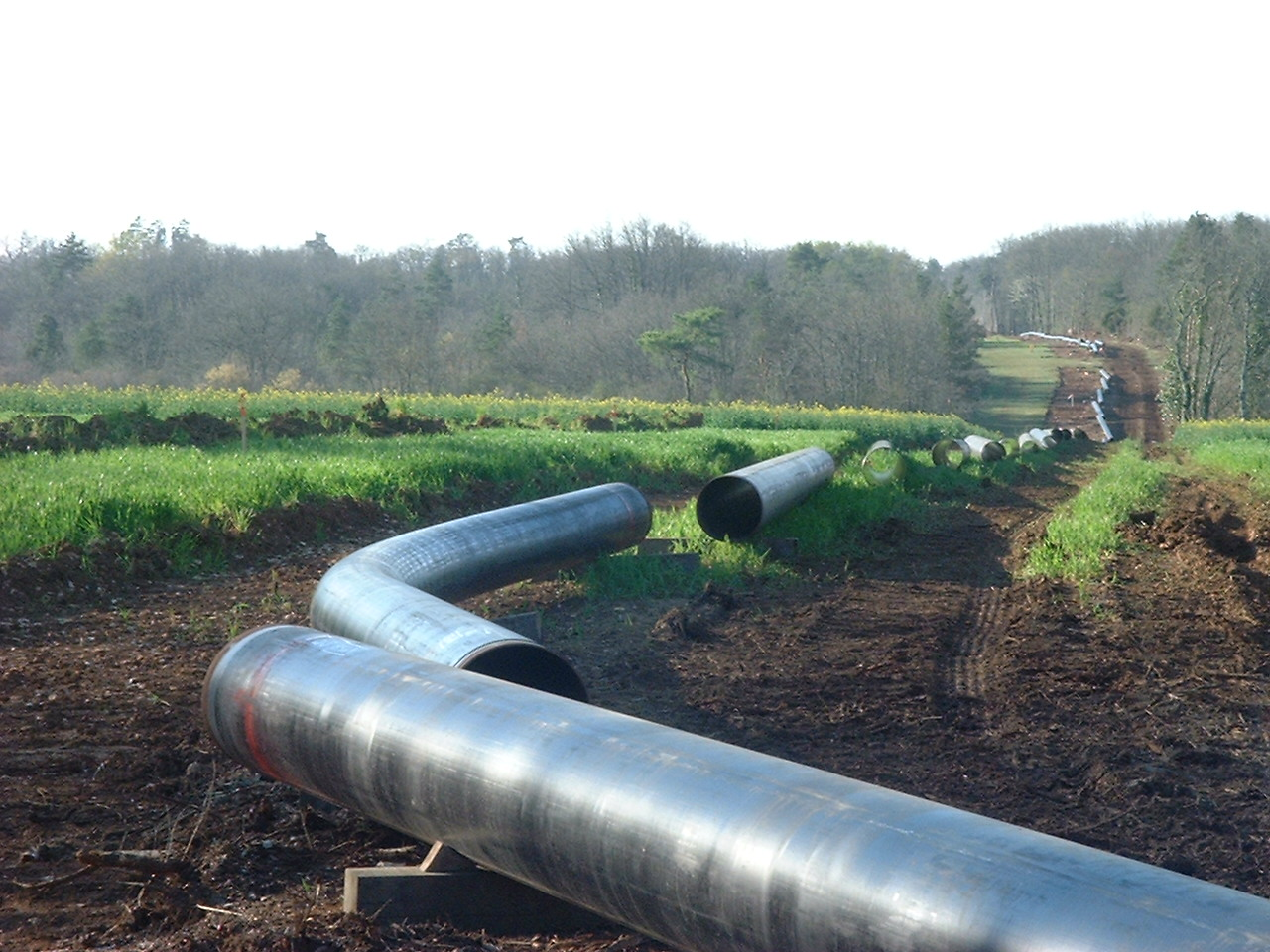 Chantier de gazoduc en cours de doublement à Chazelles (Charente, France), le 5 avril 2008. // Gas pipeline being doubled in Chazelles (France), 2008, april the 5th.